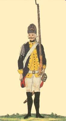 Uniform des Kreis-Infanterie-Regiments Württemberg